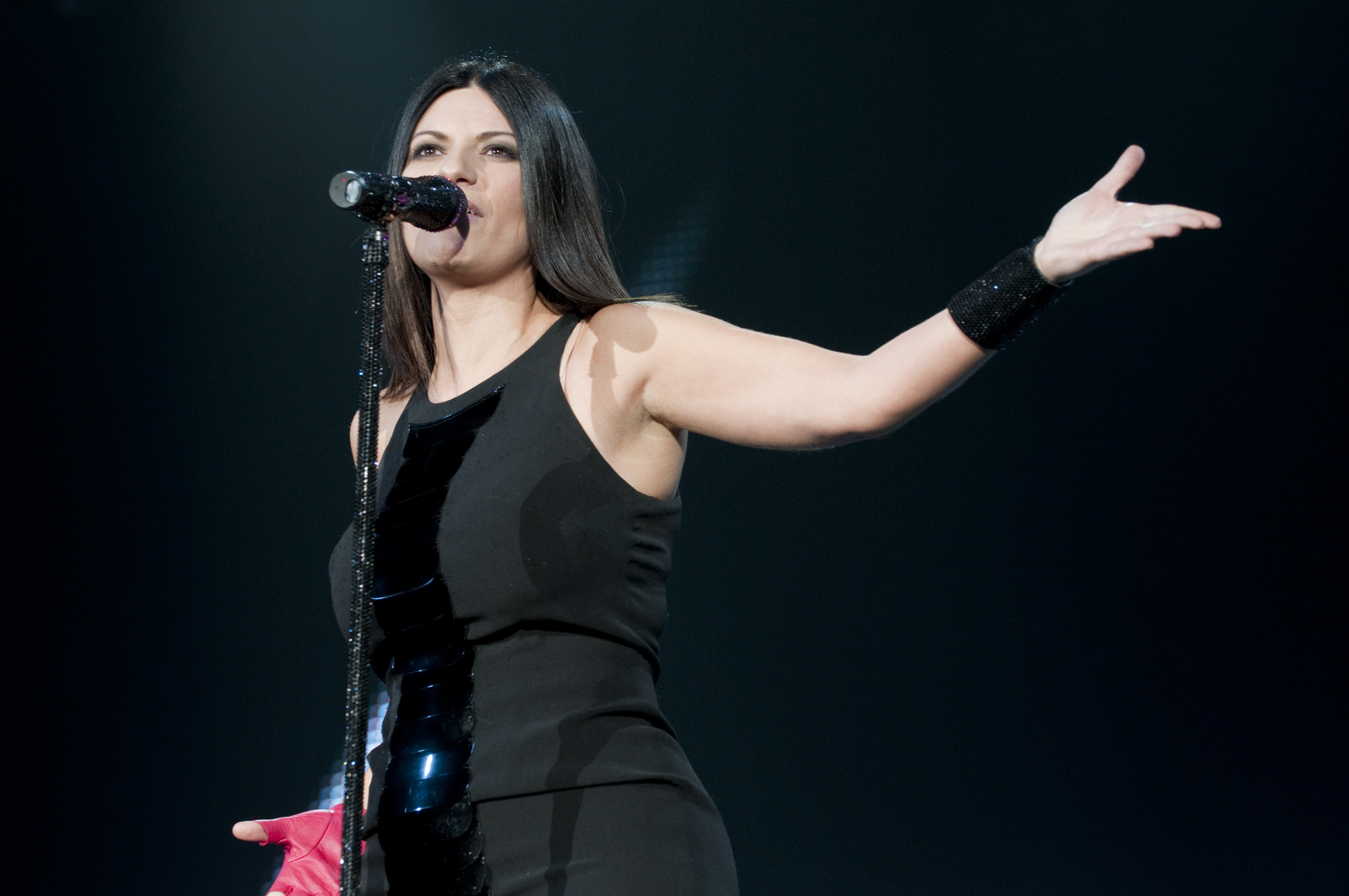 Laura Pausini